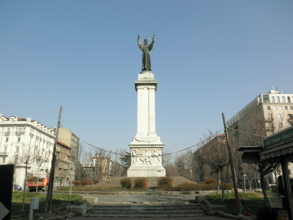 Milano, statua di San Francesco d'Assisi in piazza Risorgimento.